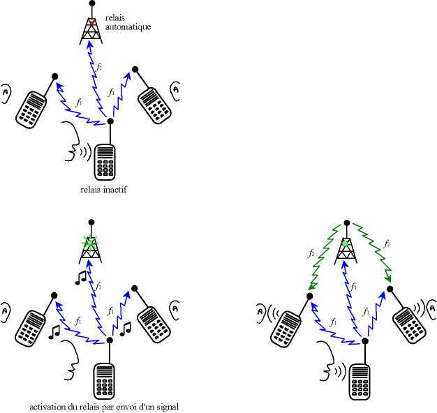 Principe des réseaux en fréquence relayée et activation du relais par un signal. Auteur : Christophe Dang Ngoc Chan (Cdang), réalisé avec un programme de dessin vectoriel.